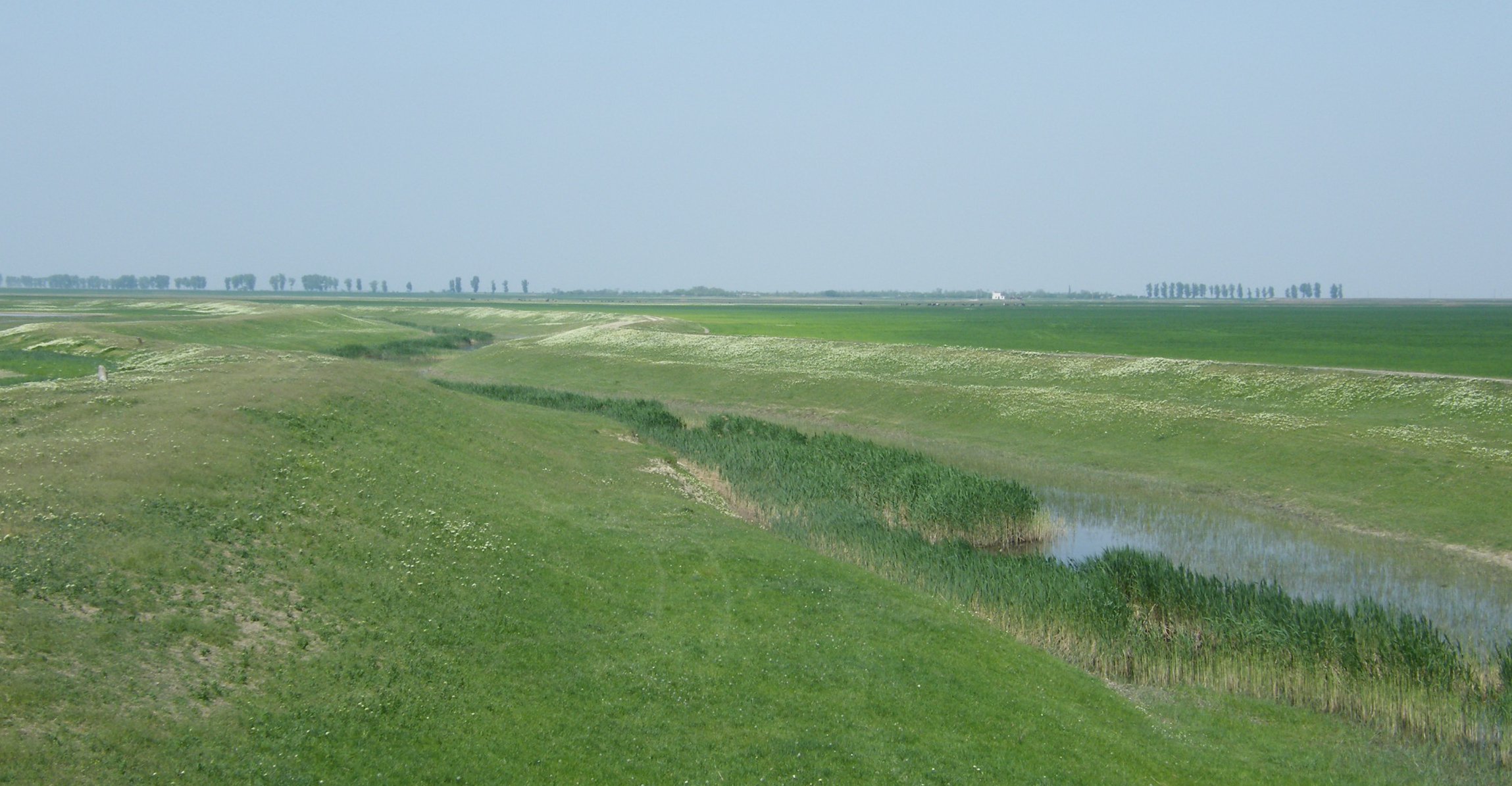 Râul Călmăţui la Filiu, comuna Bordei Verde Restricţii - fără restricţii